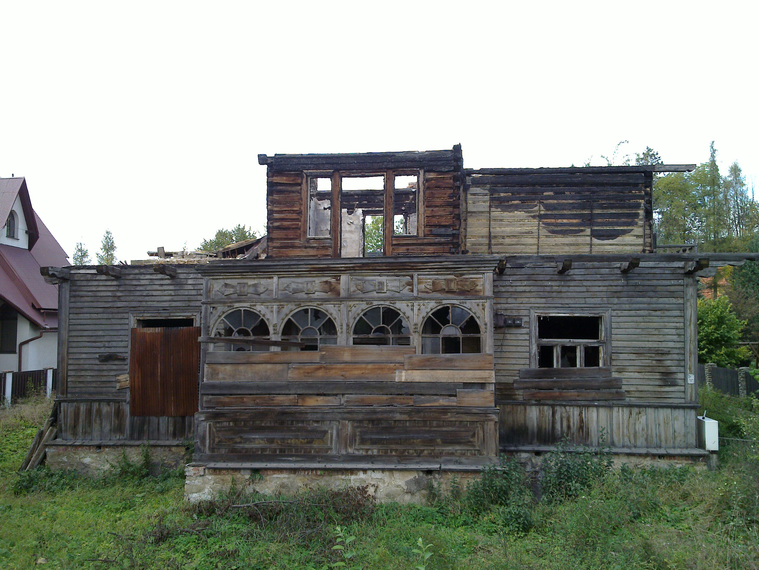 willa ,,Anna”, widok od strony bulwaru nad potokiem Czarny Dunajec Nowy Targ, ul. Kowaniec 4c,, Nowy Targ